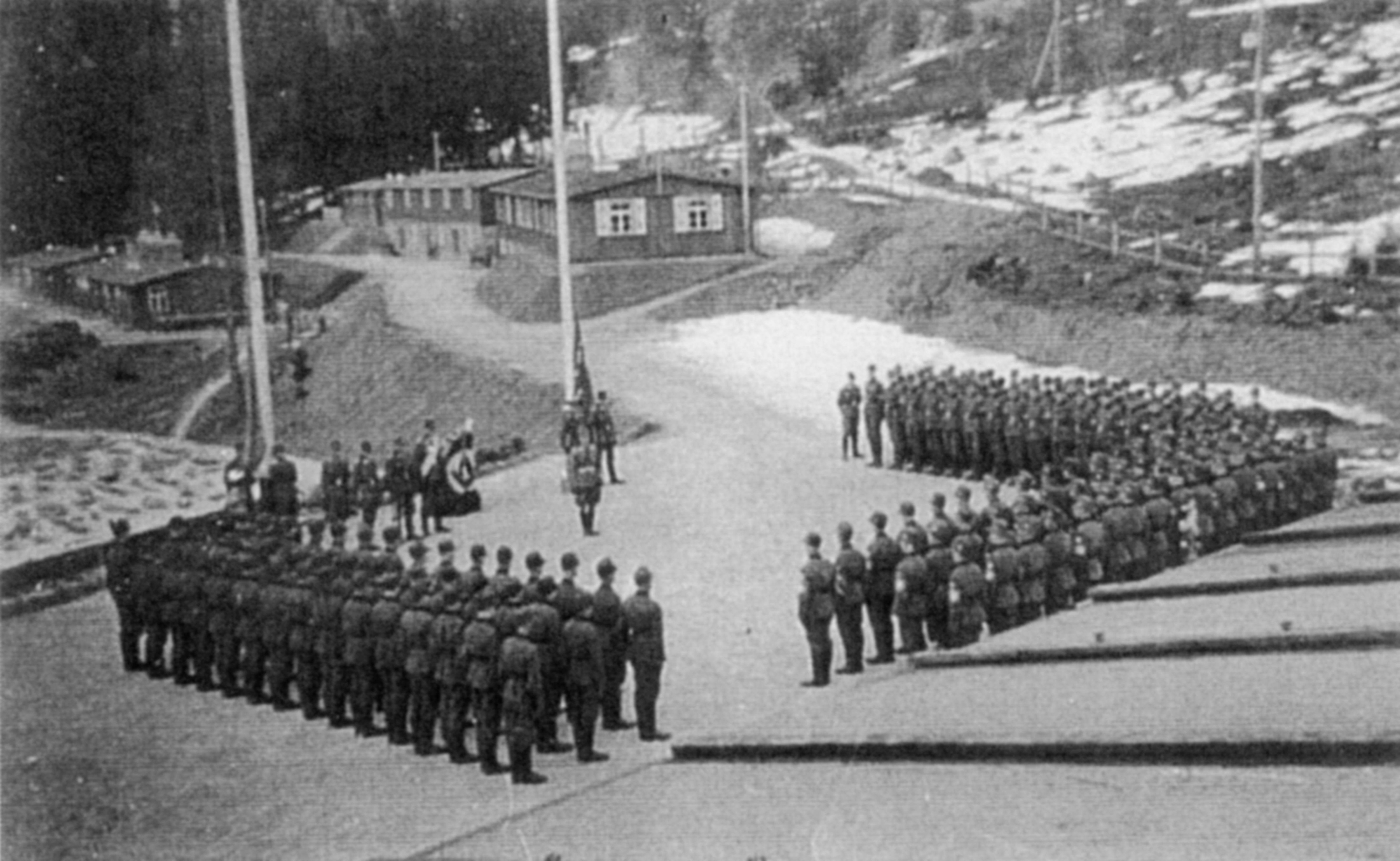 Reichsarbeitsdienst-Lager in St. Oswald in Freiland, Steiermark. Apellplatz mit angetretenen Kompanien, Lagerbaracken